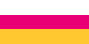 Флаг Северо-Осетинской ССР (1991) и Республики Северная Осетия (1991-1993)